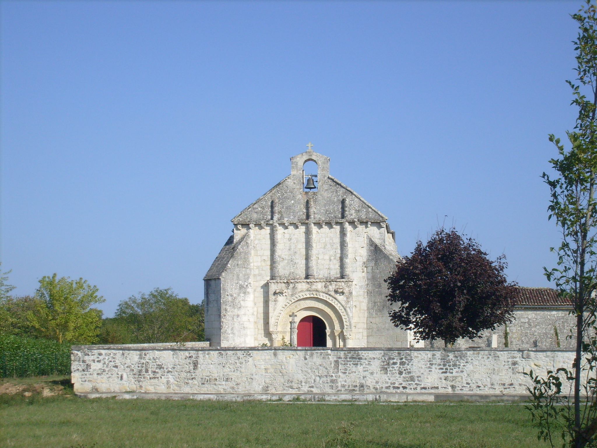 Entrée du village de La Clisse